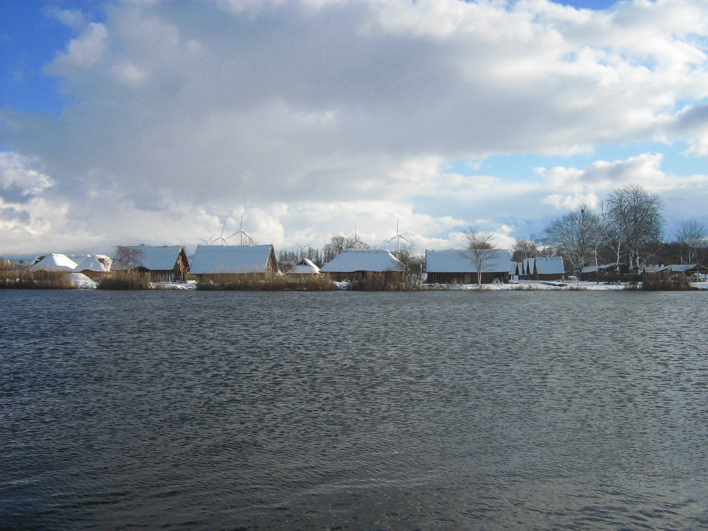 Skansen w Wolinie zimą